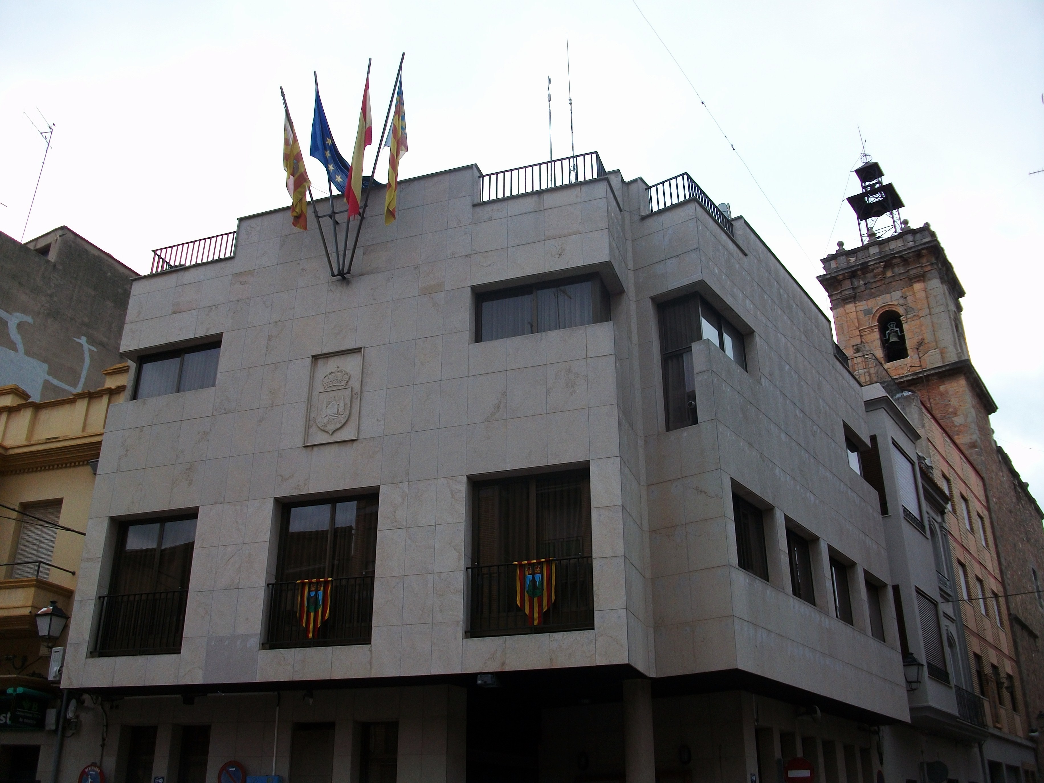 Ajuntament de Betxí.